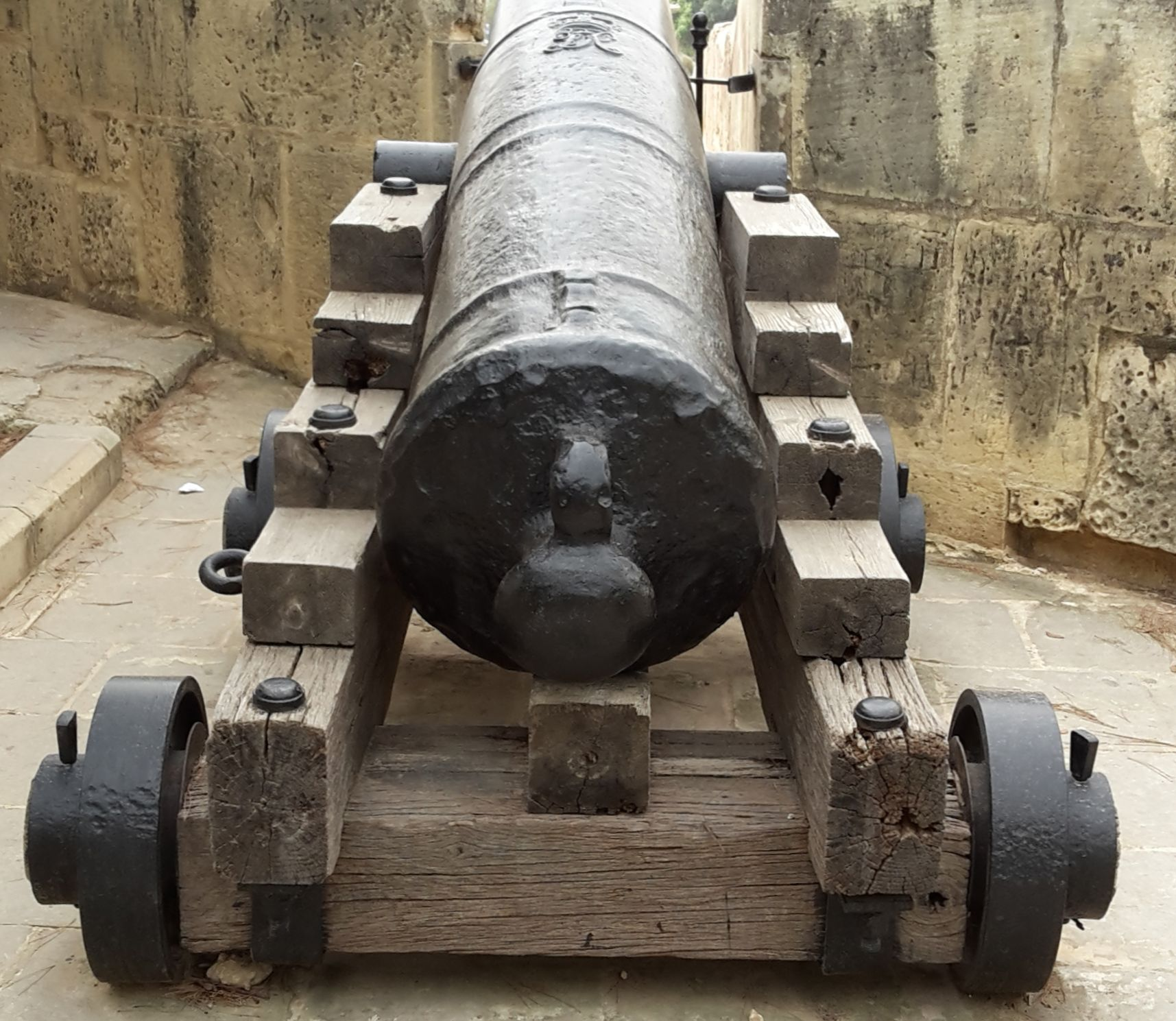 Kanone auf fahrbarem Holzgestell